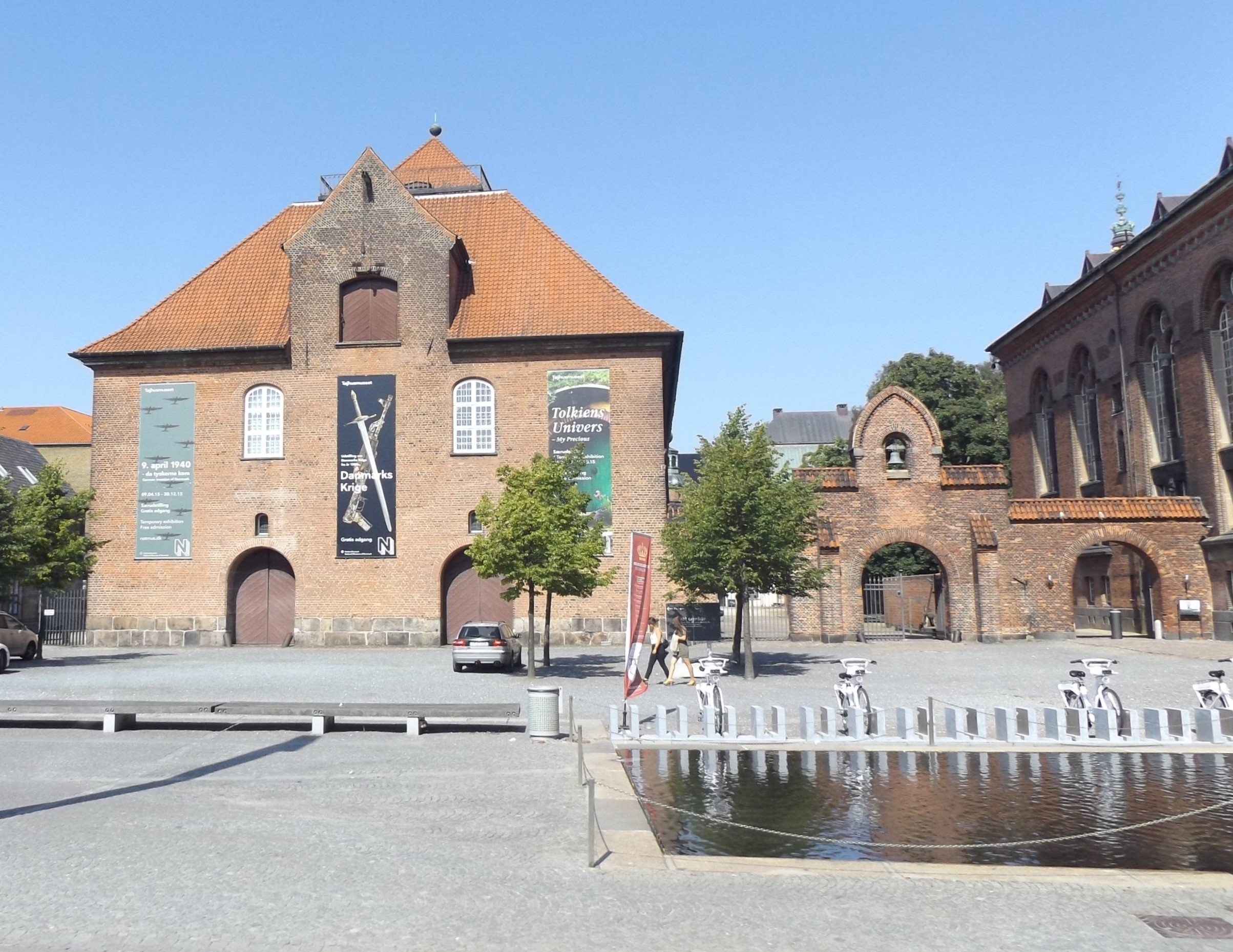 Tøjhusmuseet from Christians Brygge in Copenhagen, Denmark